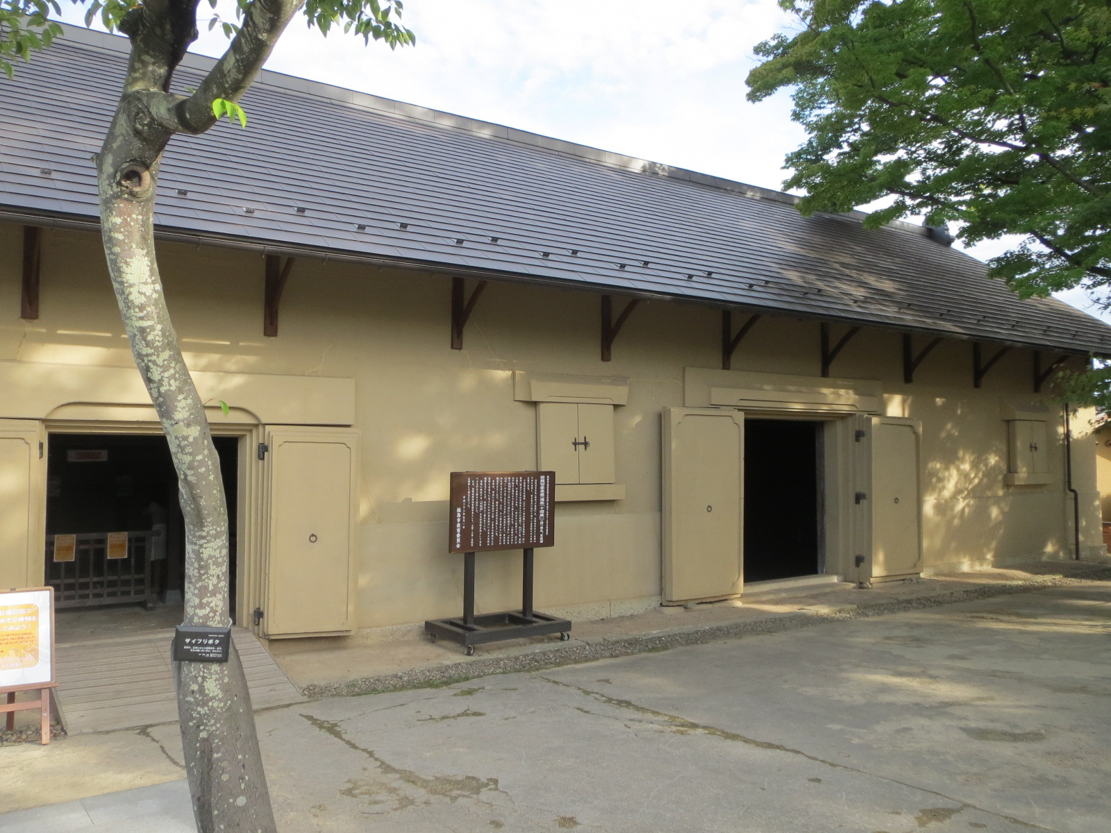 福島市にある旧堀切邸土蔵